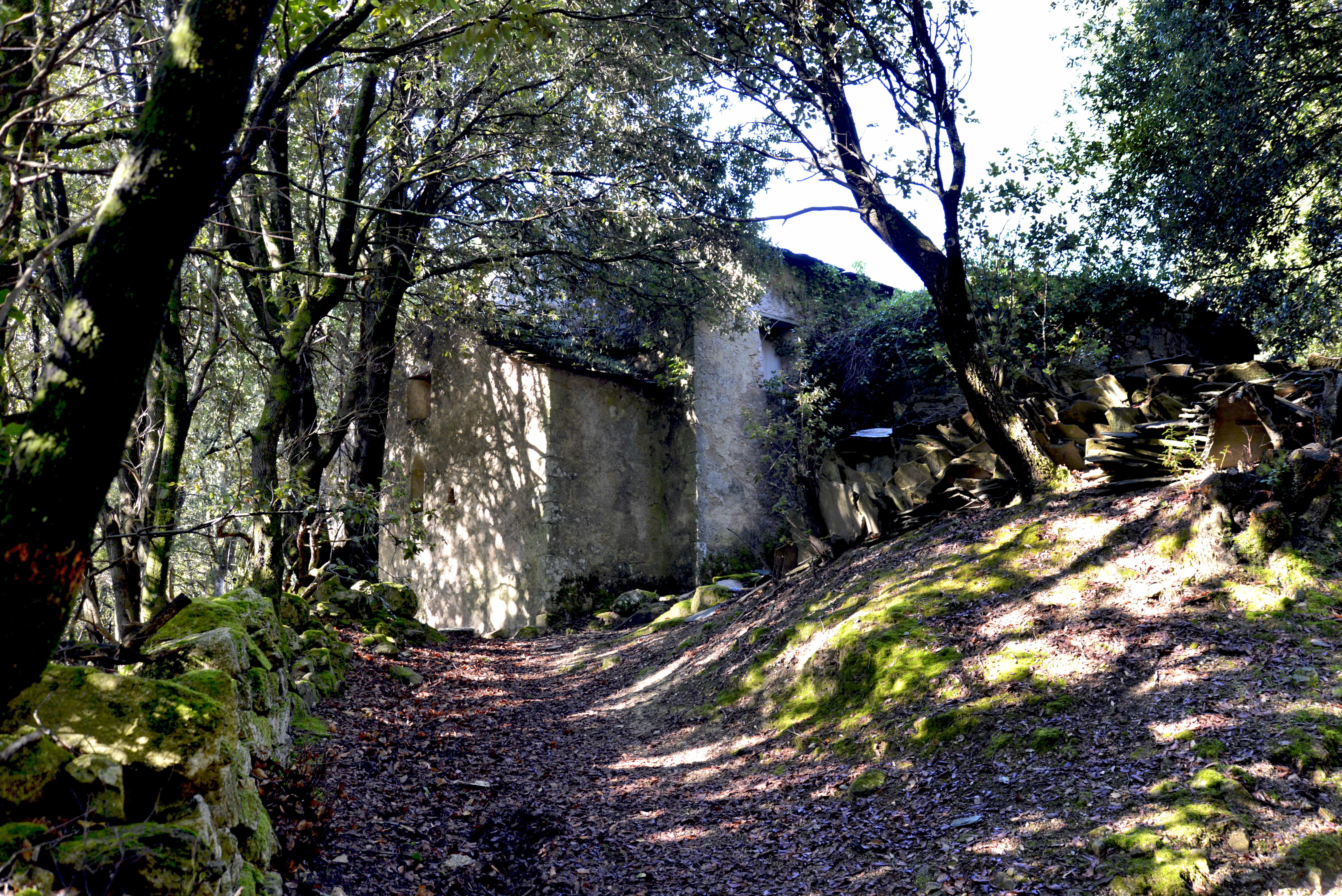 Muracciole, Centre Corse (Haute-Corse) - Chevet plat de l'ancienne église Santa Maria d'Arca. .